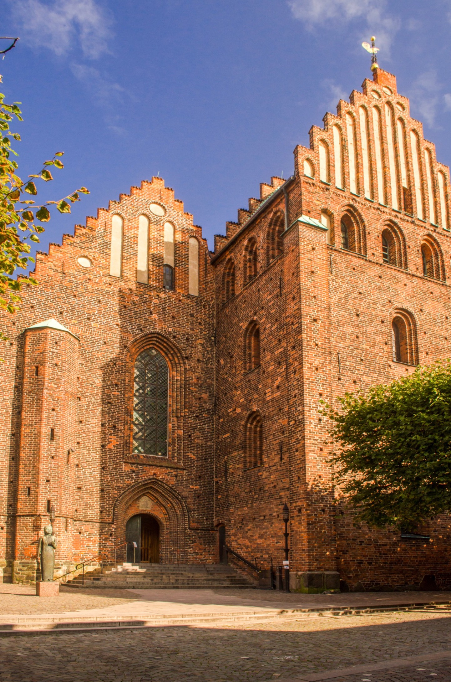 Sankta Maria kyrka (Gamla staden 8:8)